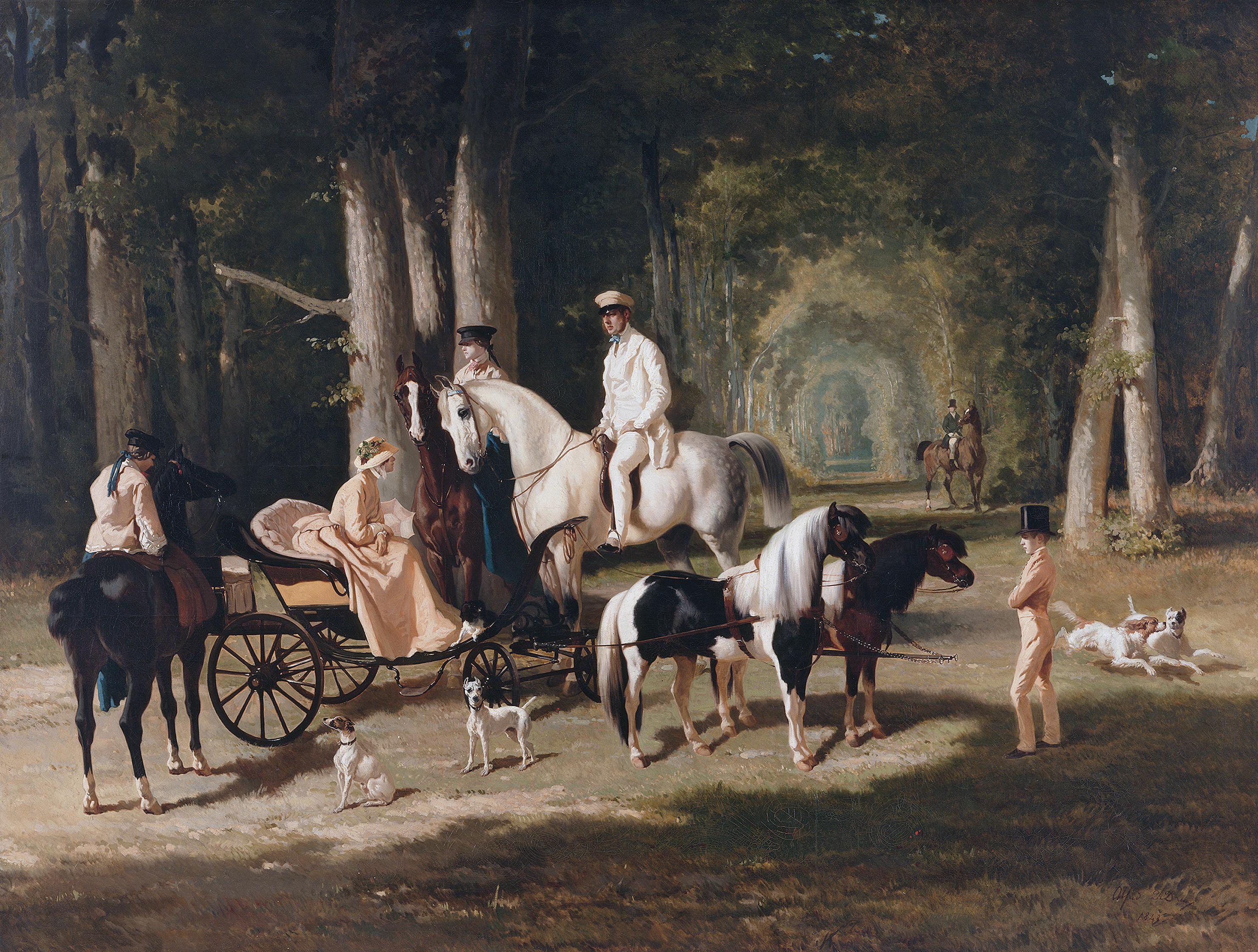 Alfred de Dreux, Portait de Monsieur et Madame Mosselman et de leur deux filles (1848), huile sur toile, 200 × 265 cm, Paris, Petit Palais.